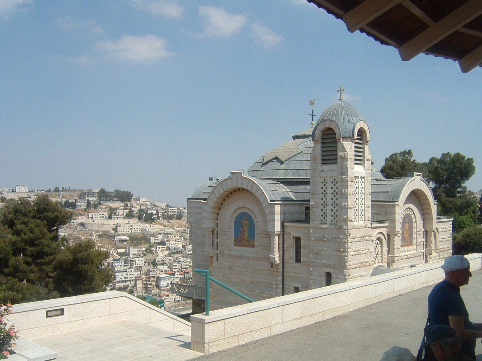 Chiesa di San Pietro in Gallicantu a Gerusalemme. Foto scattata da me l'11 giugno 2008